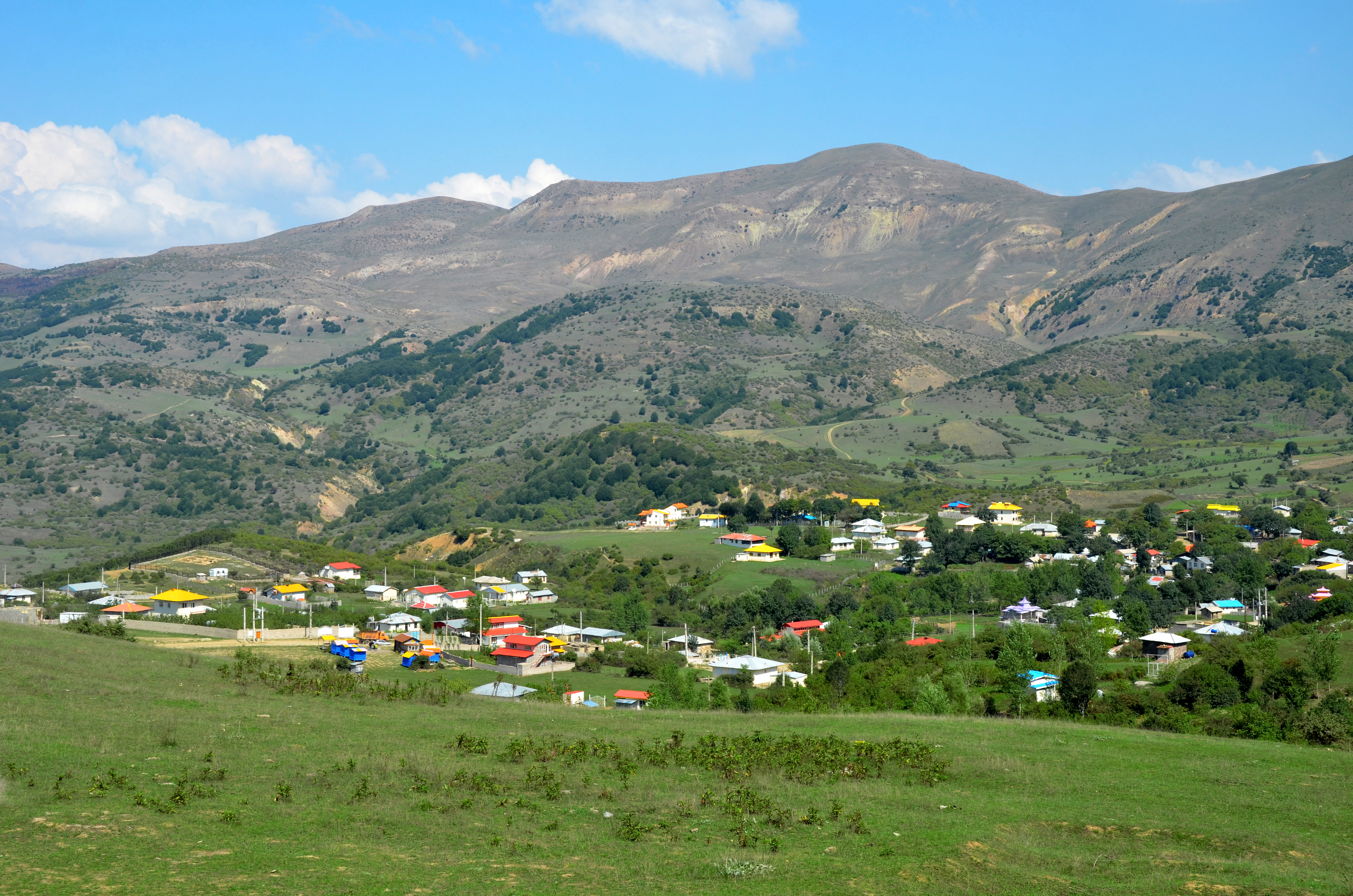 Gilan - Deylaman